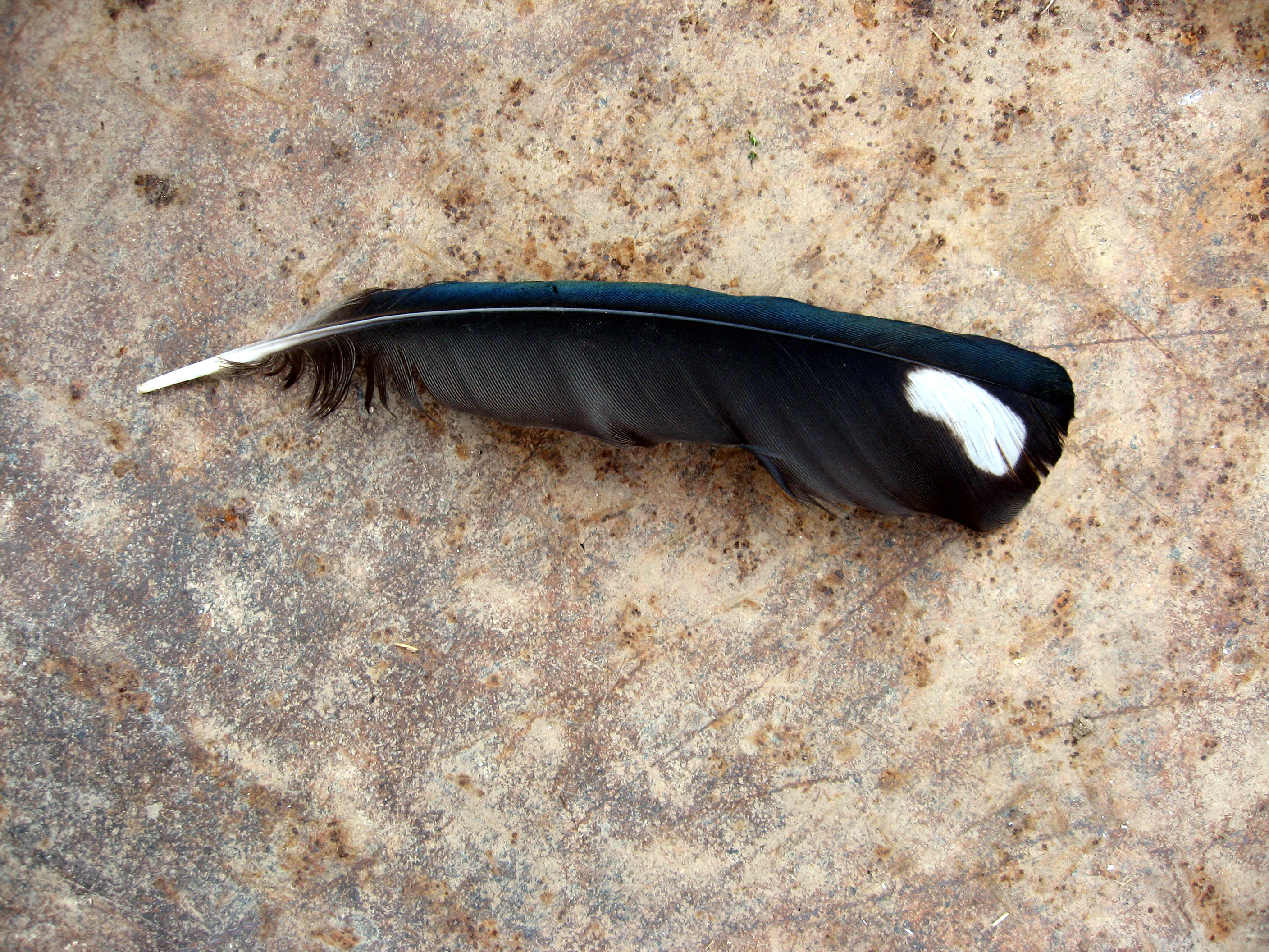 Ptačí brko, zřejmě ruční letka straky (Pica pica)